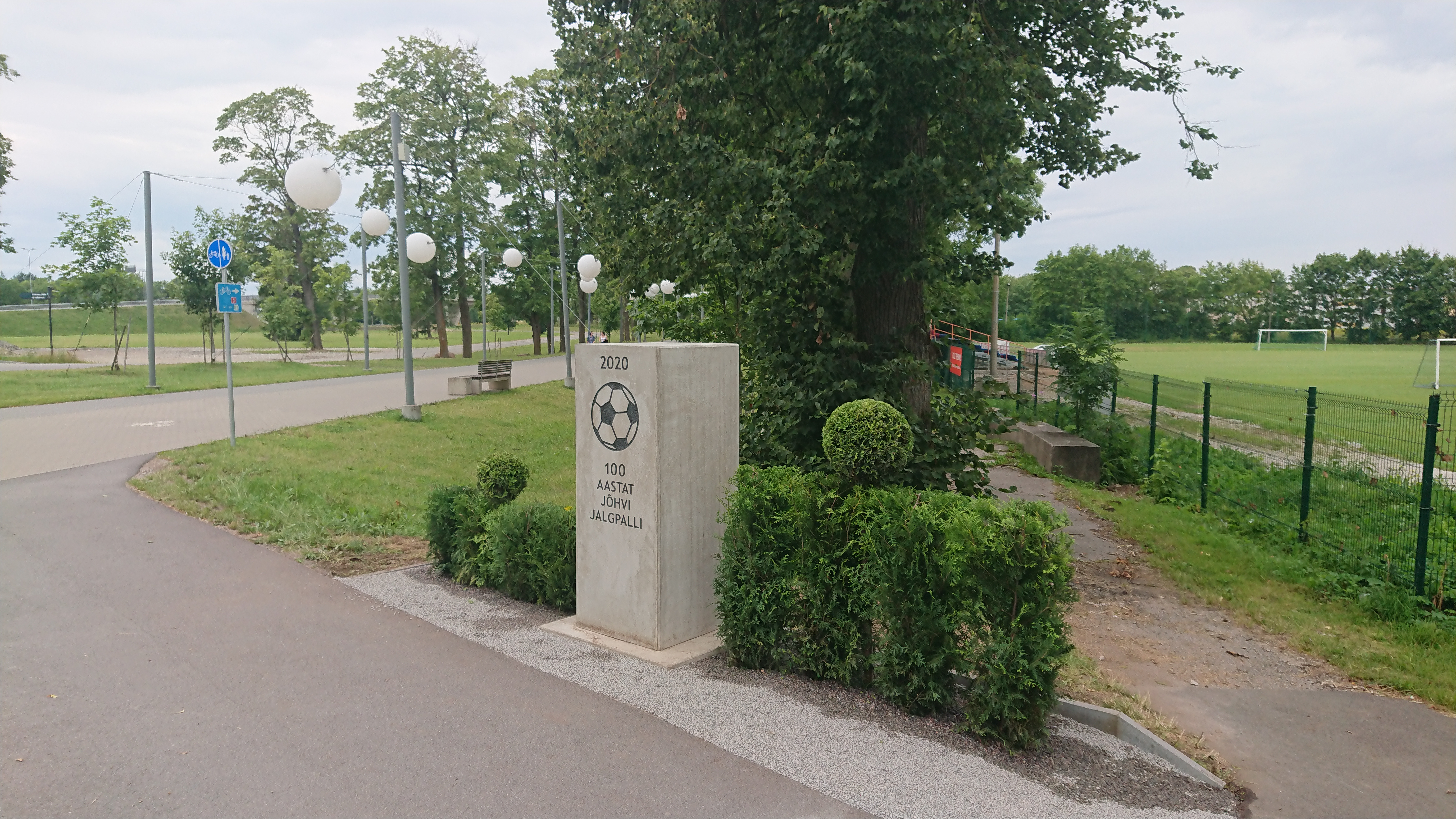 100 лет футболу в Йыхви